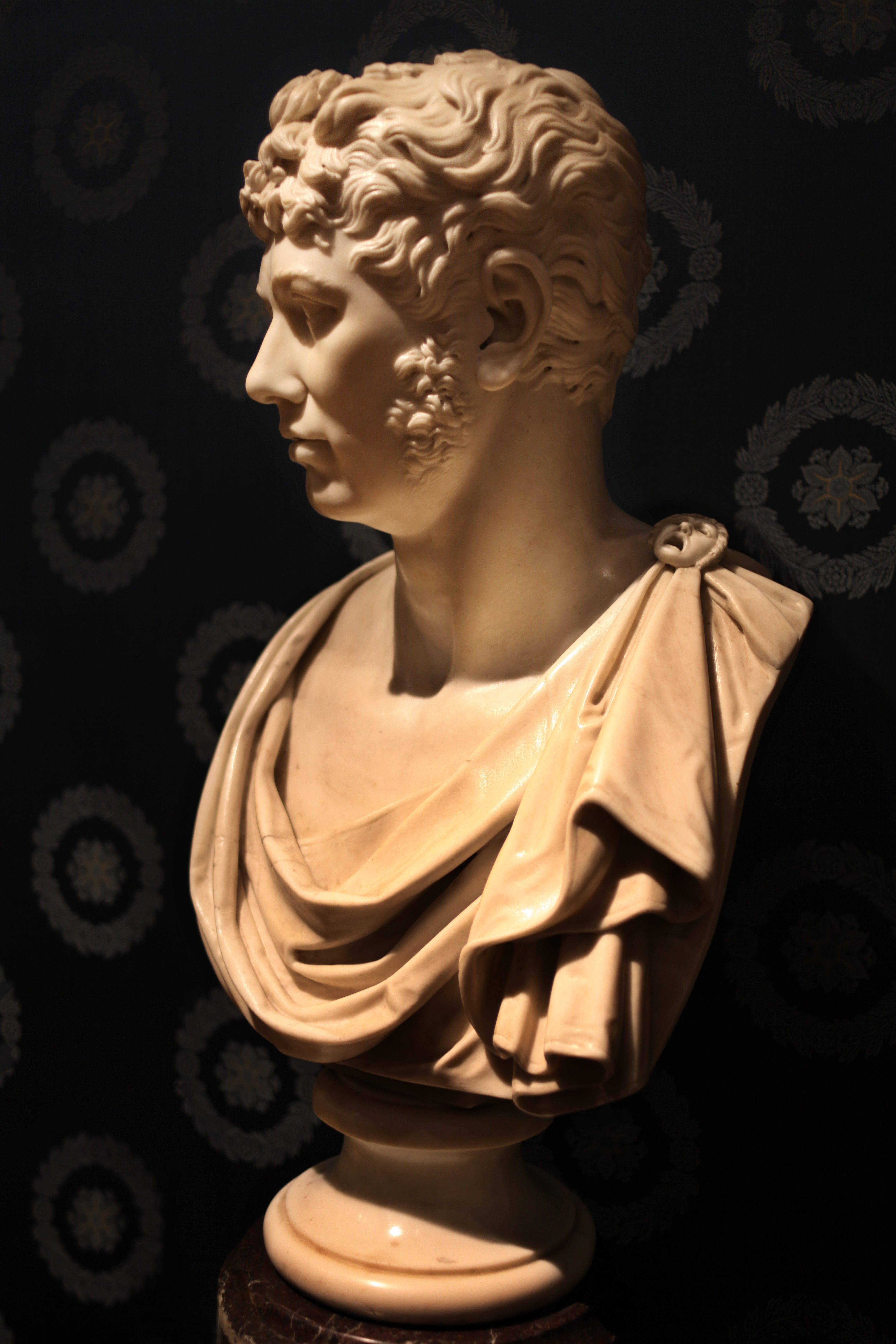 Antonio Canova (1757-1822) Busto di Nicola Tacchinardi, al Museo del Teatro alla Scala, Milano